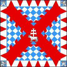 Bandera de Caravaca de la Cruz, en Murcia (España)